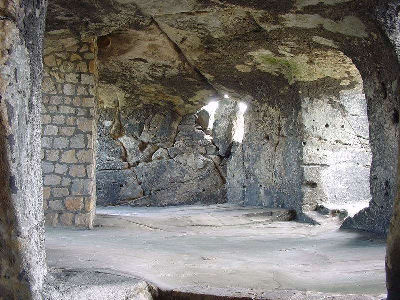 Regenstein - In den Felsen gehauener Raum in der mittelalterlichen Kernburg